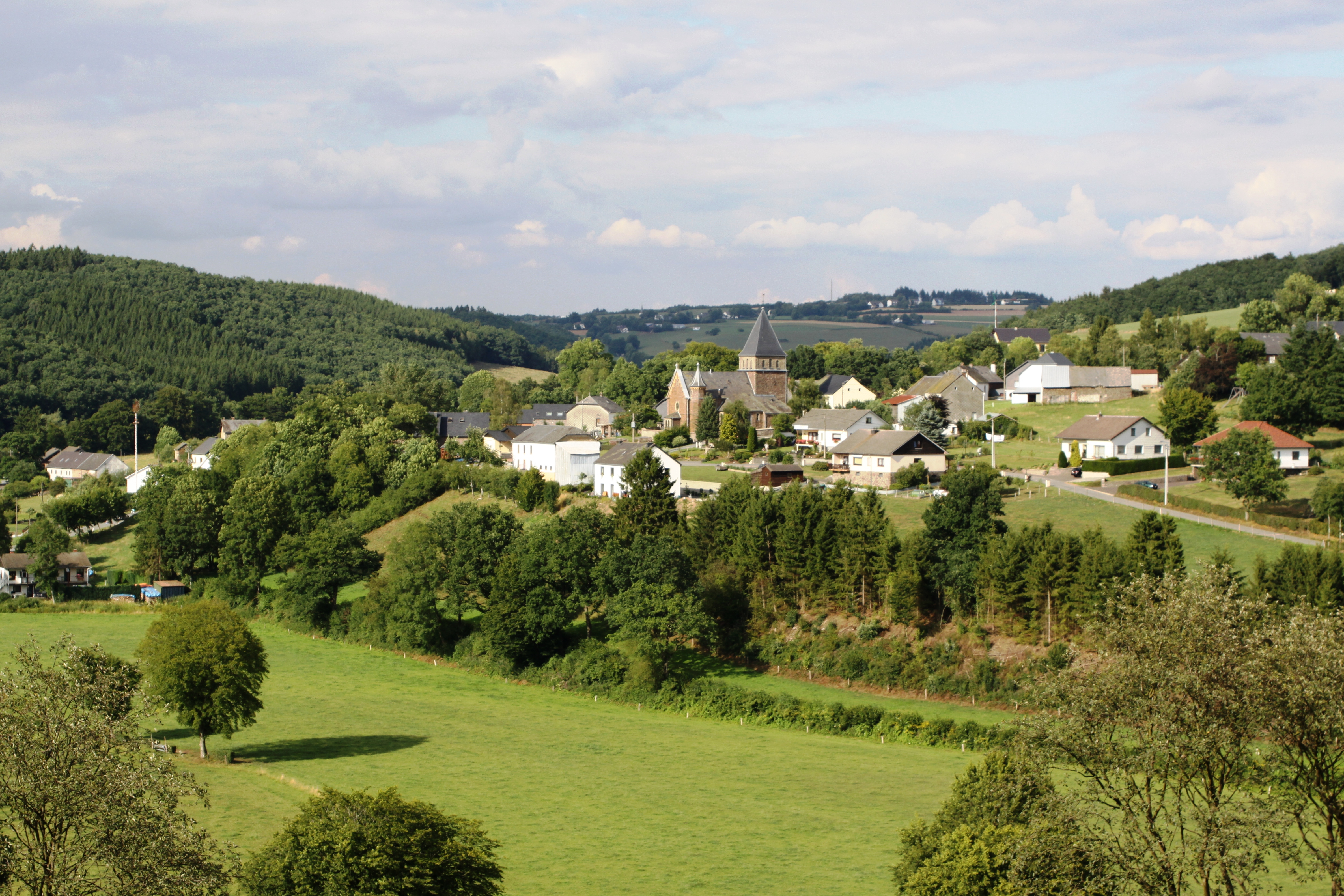 Steffeshausen vum Weweler Wee aus gesinn. Steffeshausen Steffeshausen